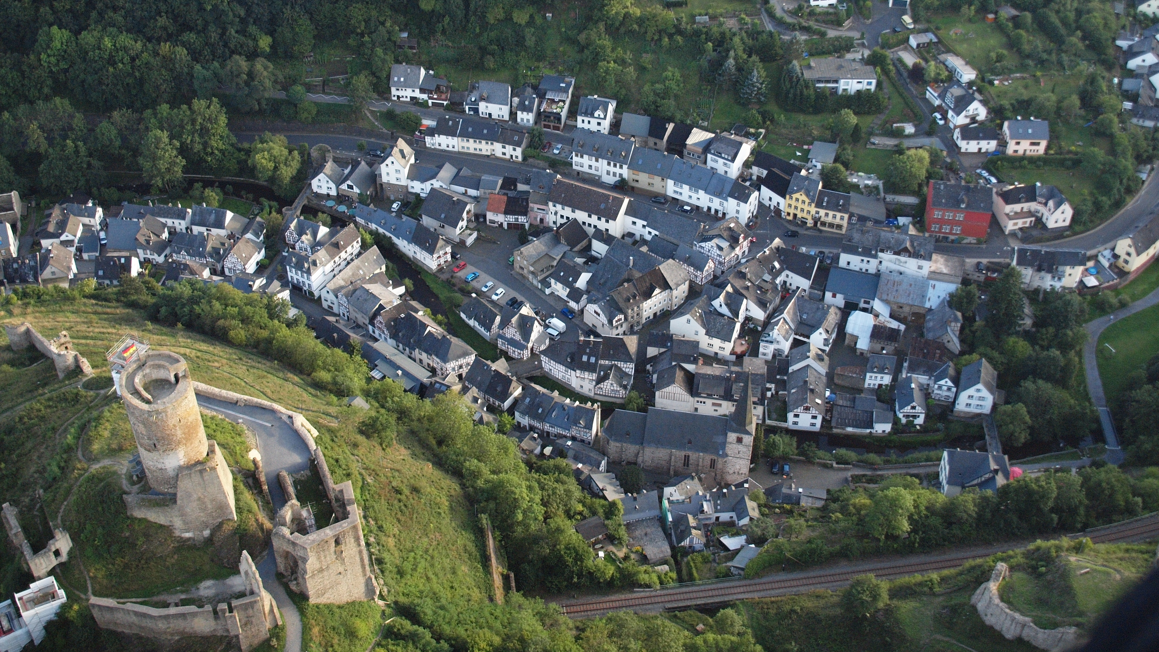 Monreal, Luftaufnahme (2015)